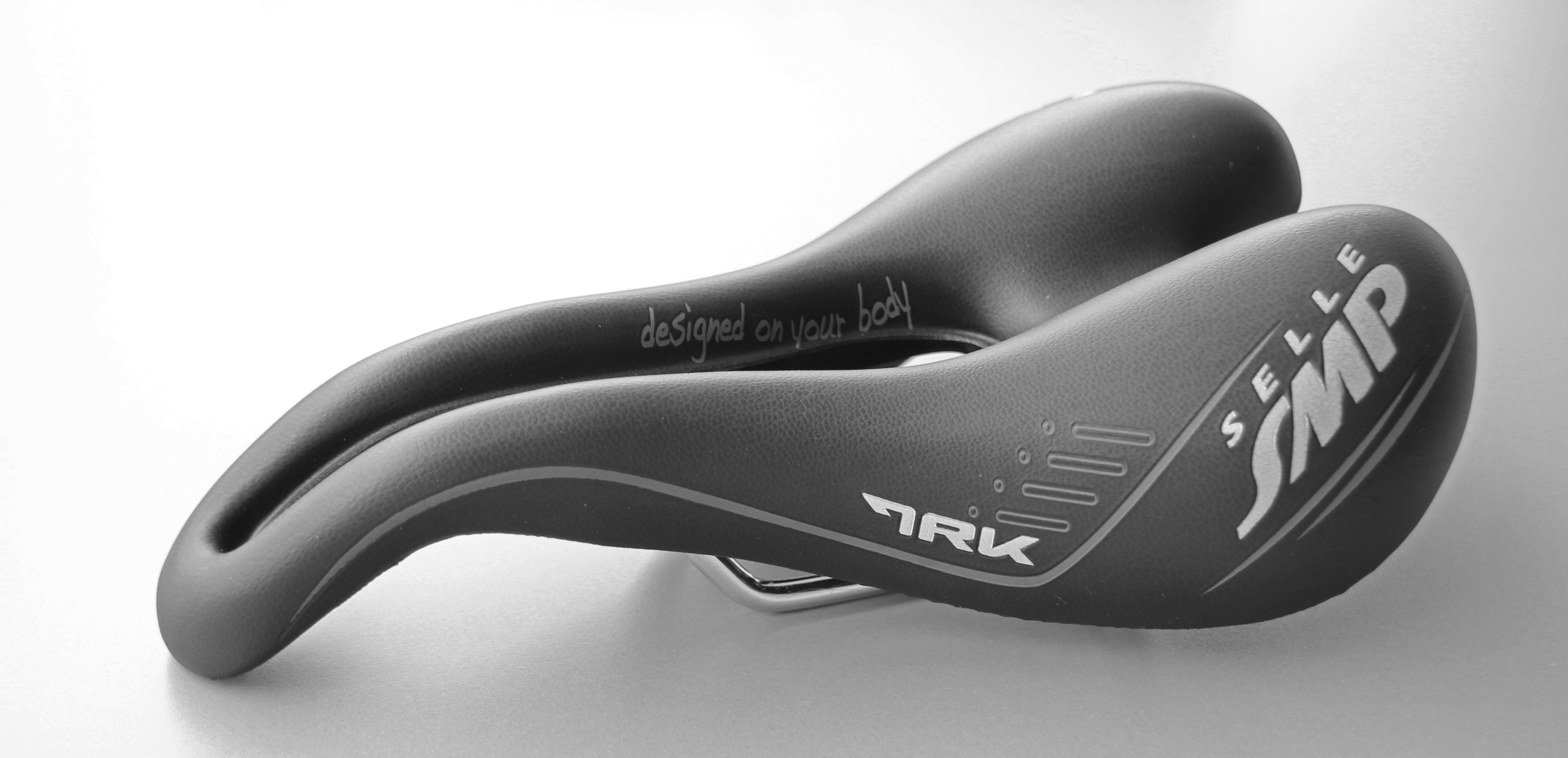 Bildinhalt: Fahrradsattel mit Mittelschlitz der Firma Selle SMP. Sicht von schräg oben. Schwarz/weiß. Aufnahmeort: Frankfurt am Main, Deutschland